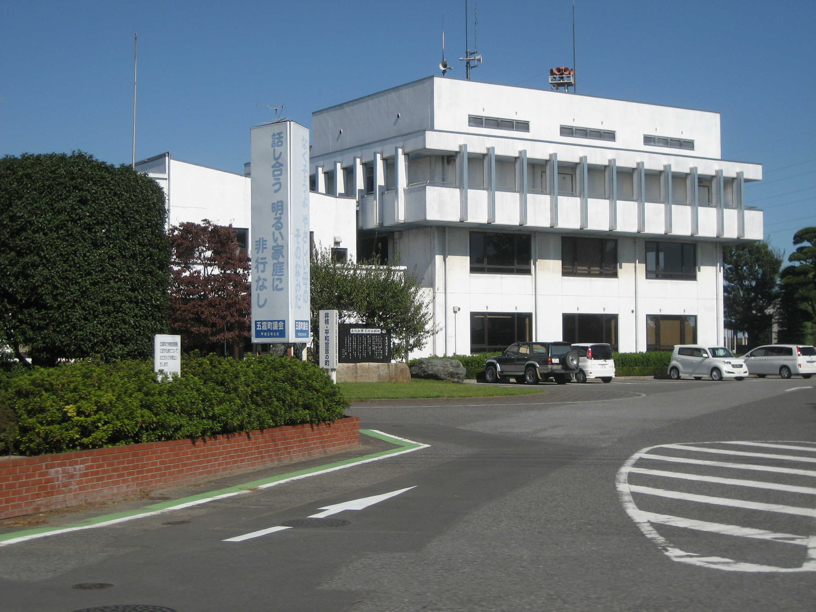 五霞町役場